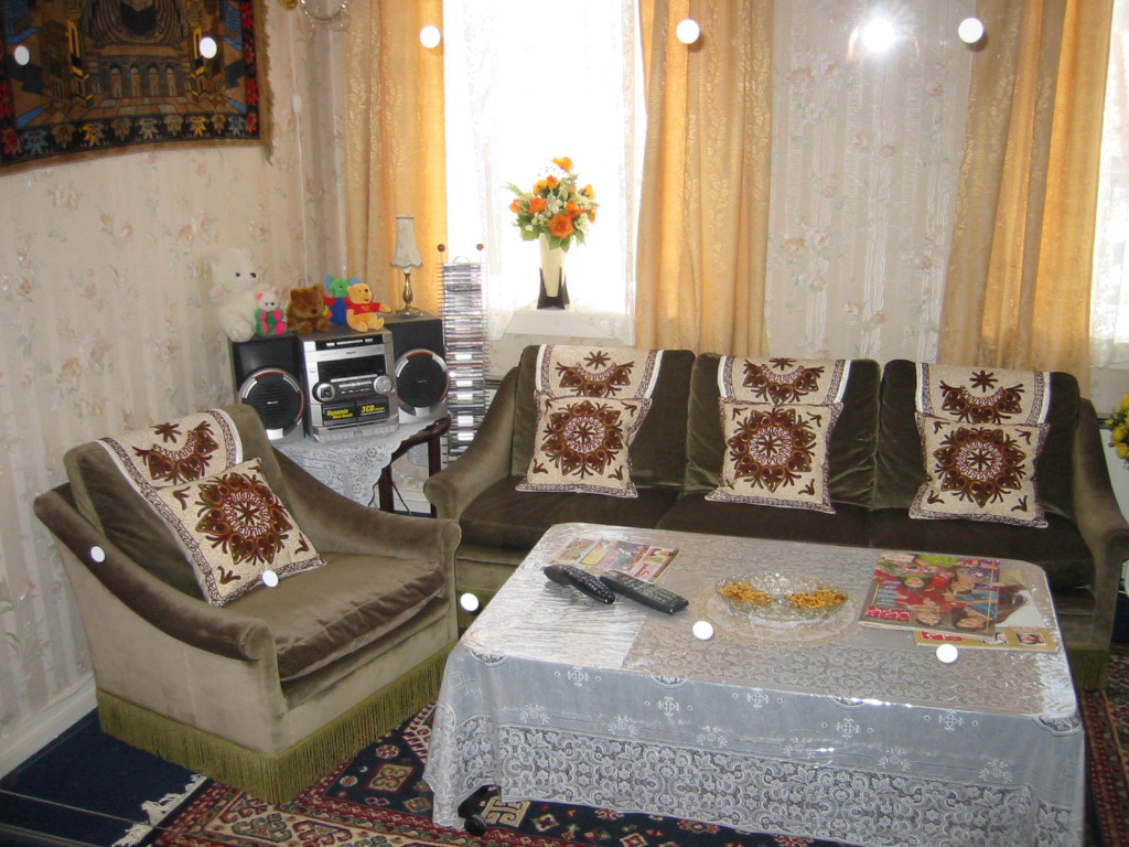 Norsk folkemuseum Oslo, Et pakistansk hjem